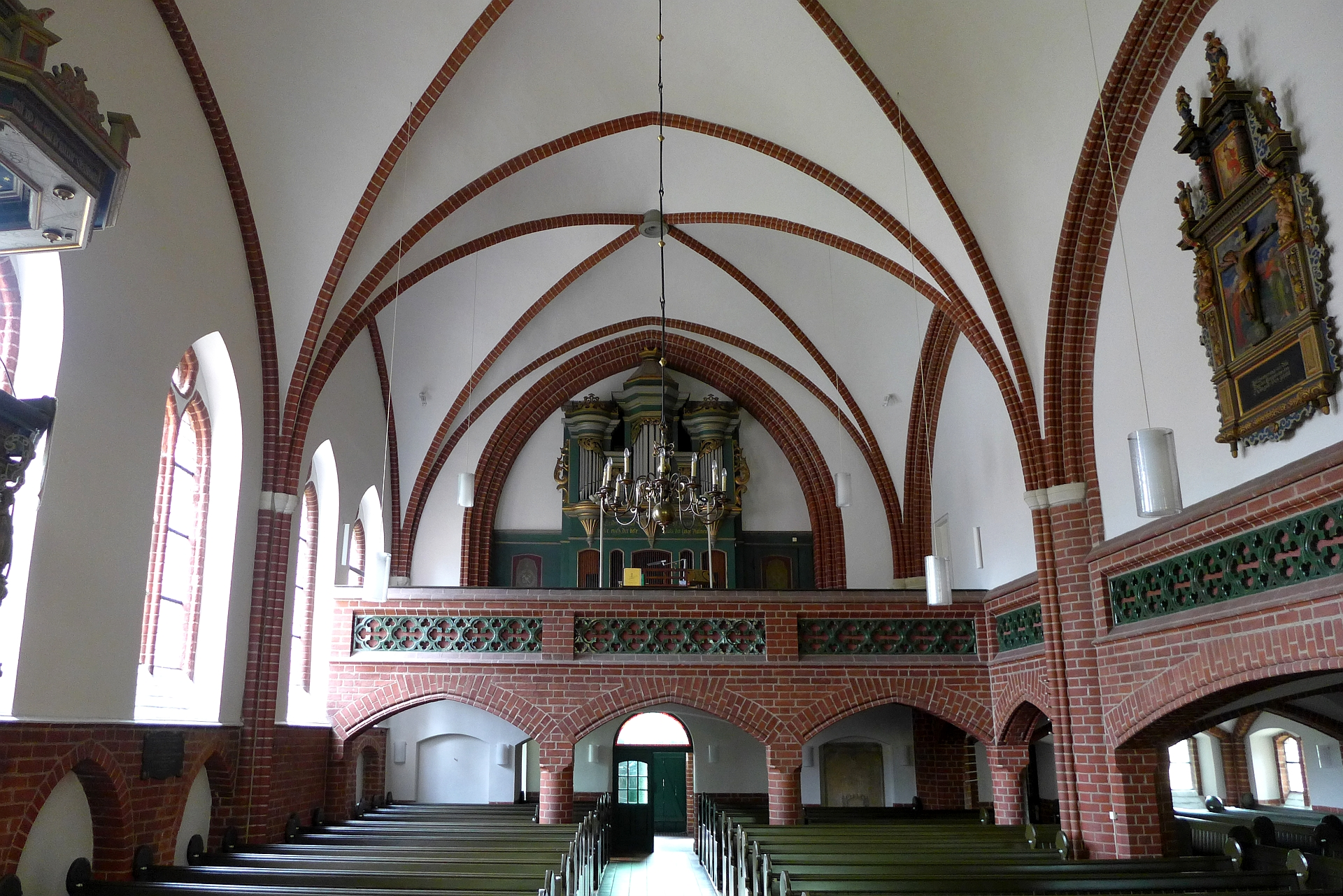 Innenansicht der St.-Johannes-Kirche zu Dahlenburg mit Blick auf die Orgelempore. Aufnahmedatum 2015-05.